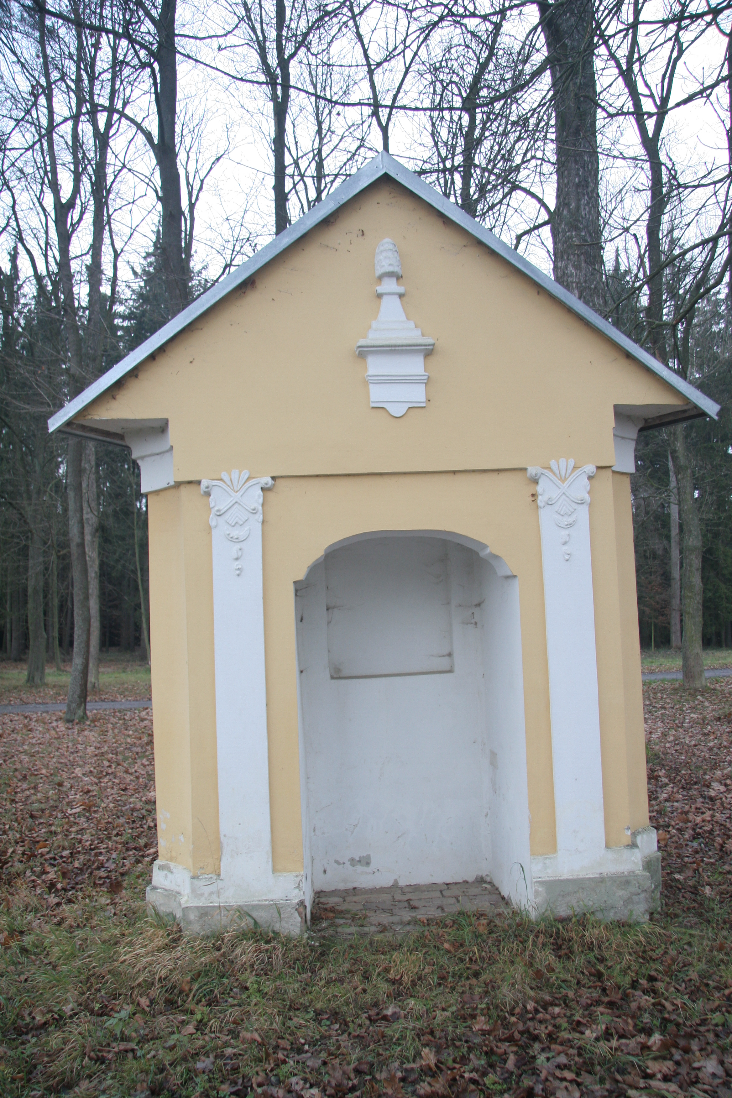 Kostel svaté Anny s křížovou cestou, v lese, místní část zvaná Sv. Anna, Pohled (okres Havlíčkův Brod).